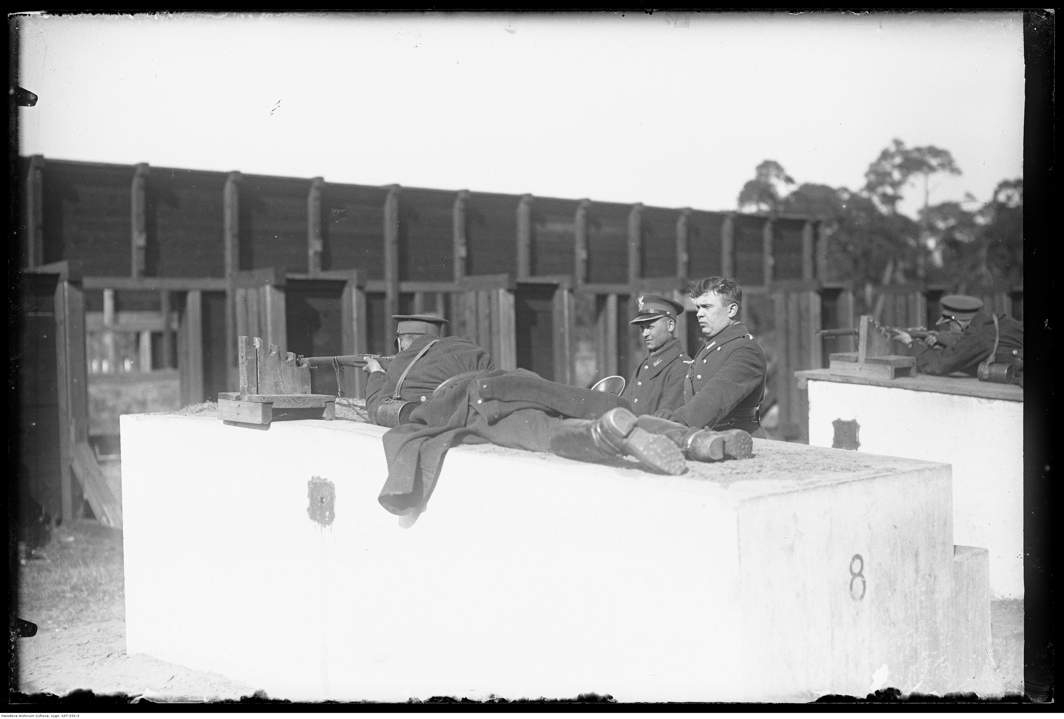 Żołnierze 1 Pułku Szwoleżerów podczas ćwiczeń strzeleckich.